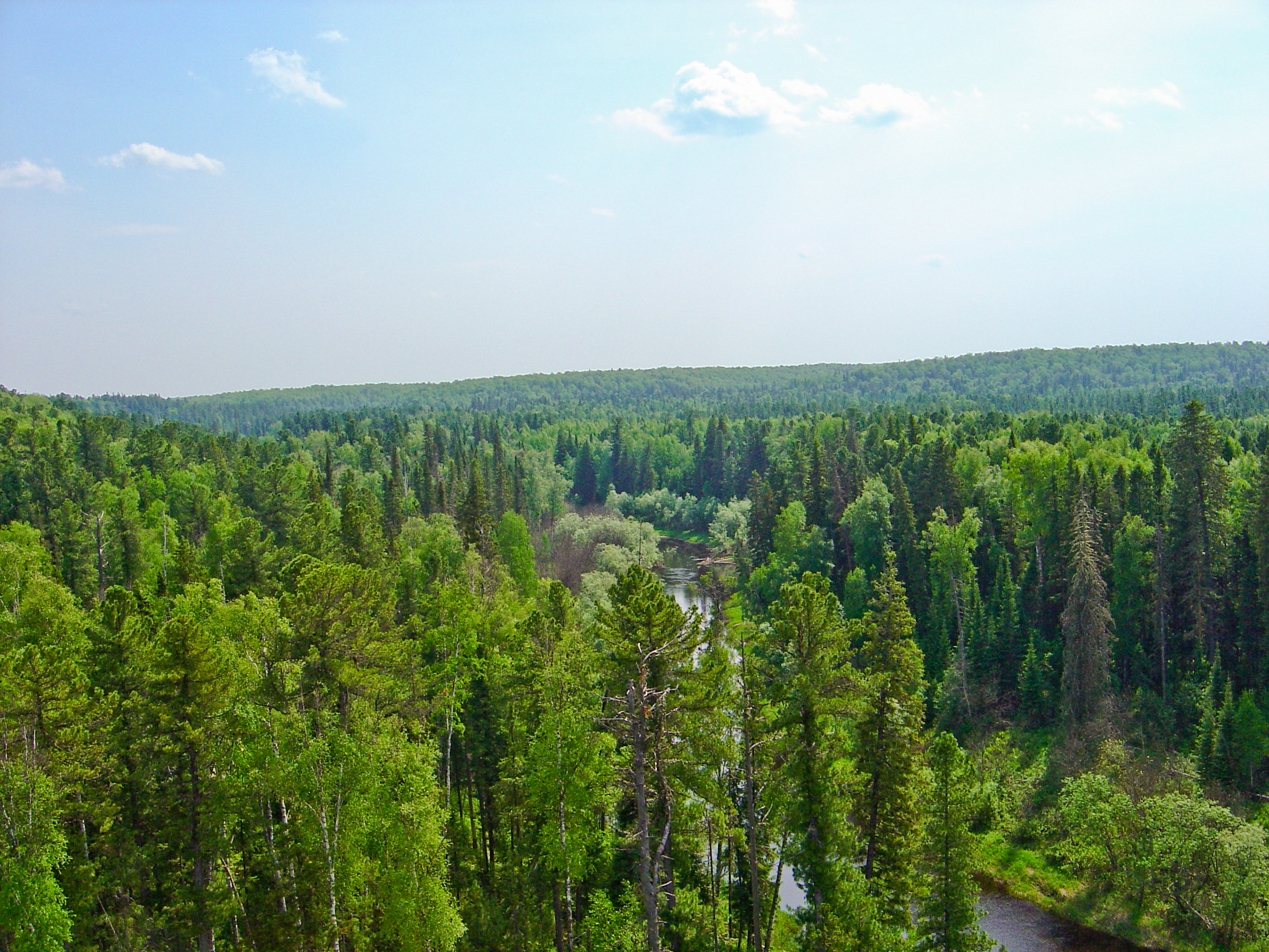 Снимок р. Негусьях с вертолета. Внизу заповедник Юганский, темнохвойная тайга